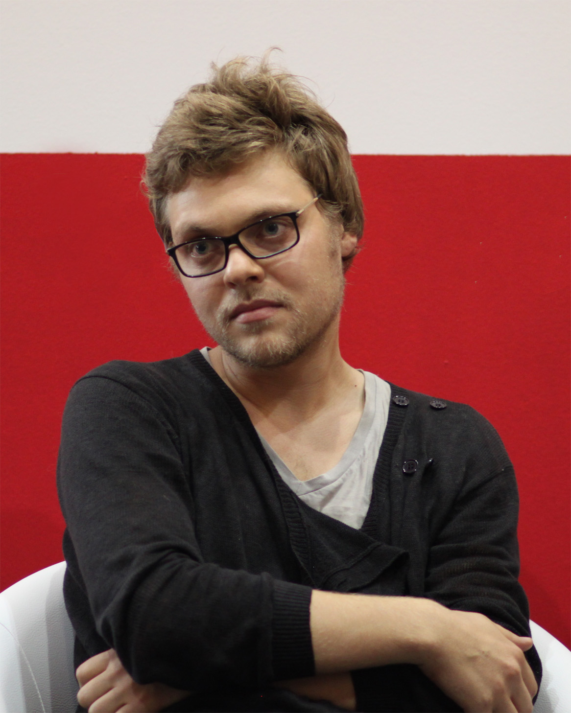 Oleg Stavitsky